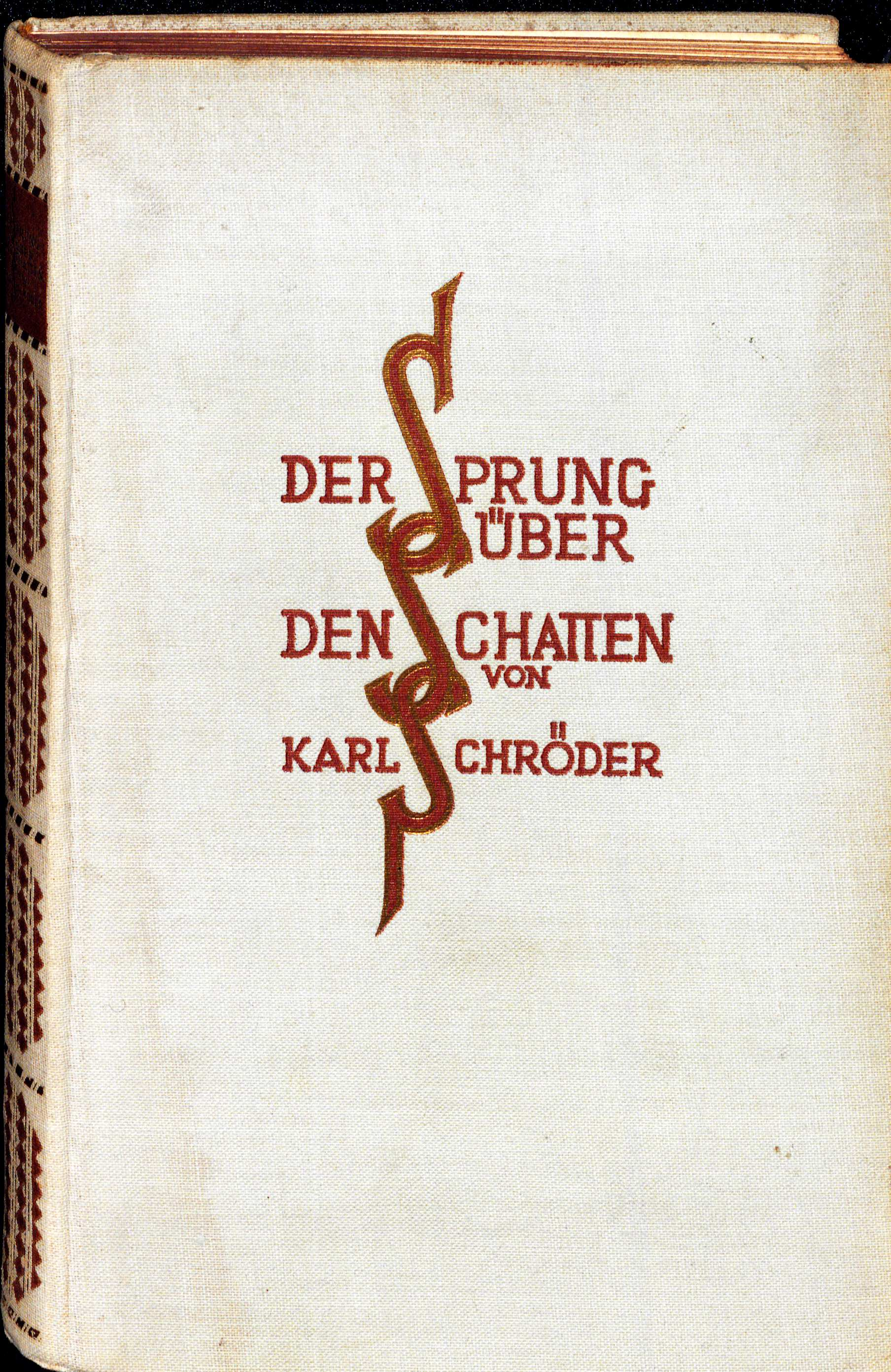 Karl Schröder (Schriftsteller) Der Sprung über den Schatten 1928. Einband Theodor Schultze-Jasmer